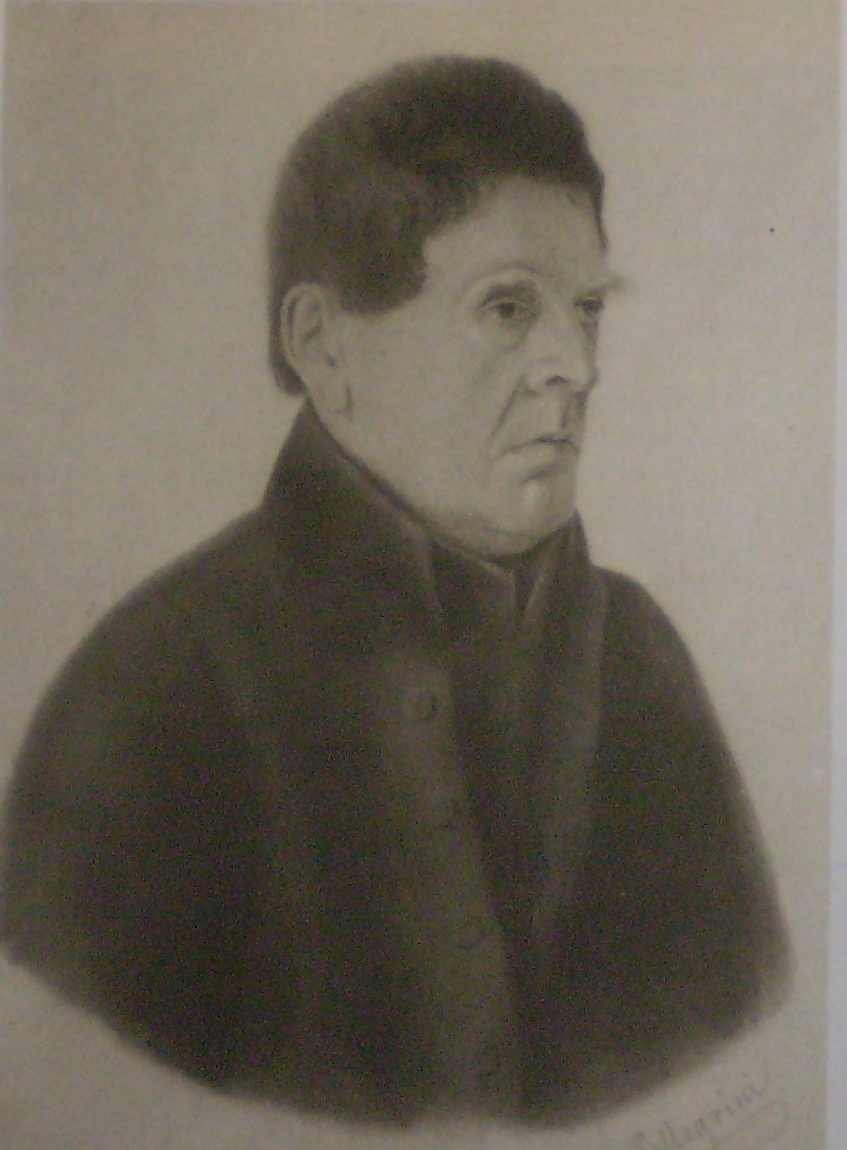 Francisco Antonio de Escalada. Dibujo de E. Pellegrini